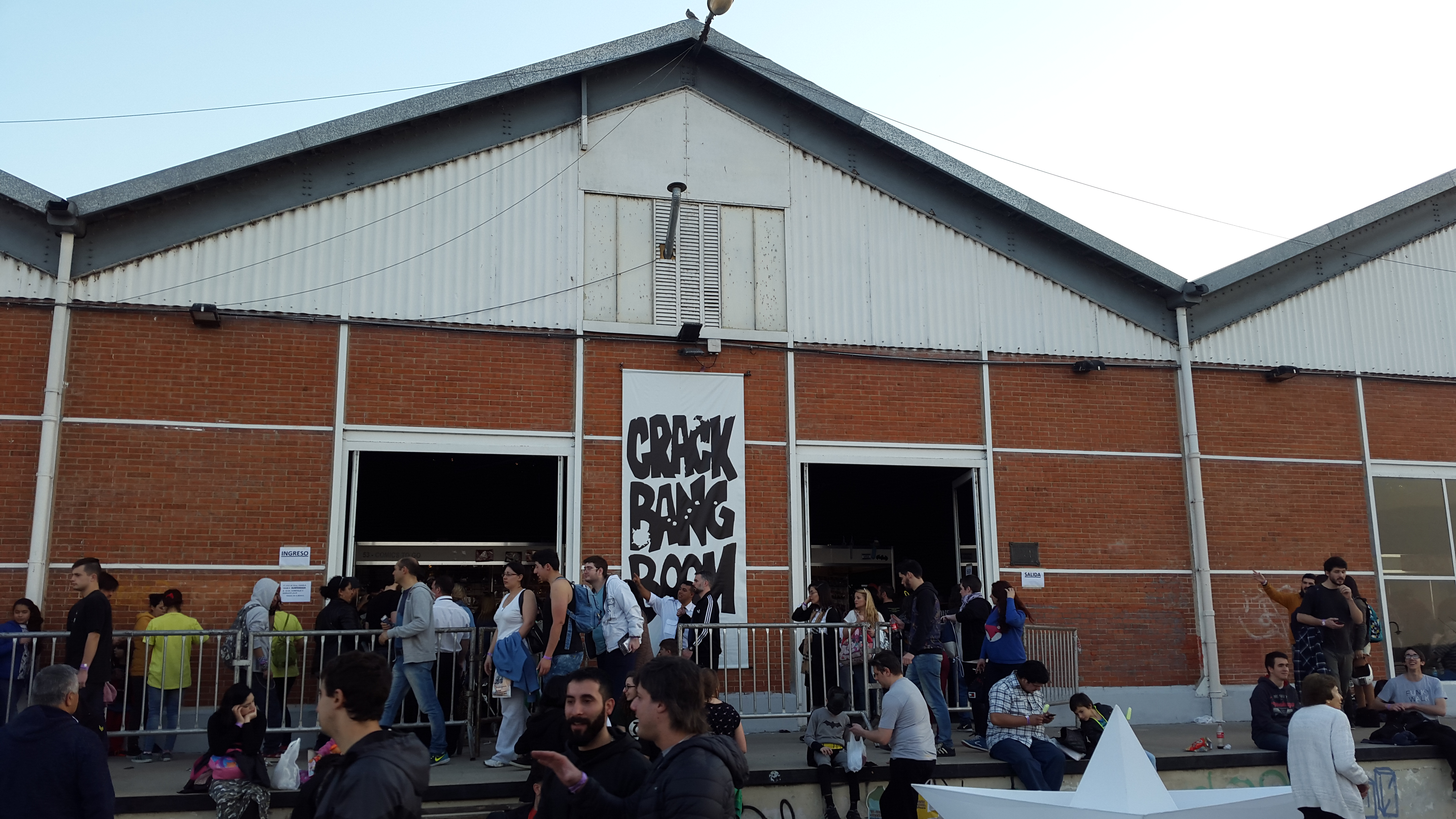 Pabellón